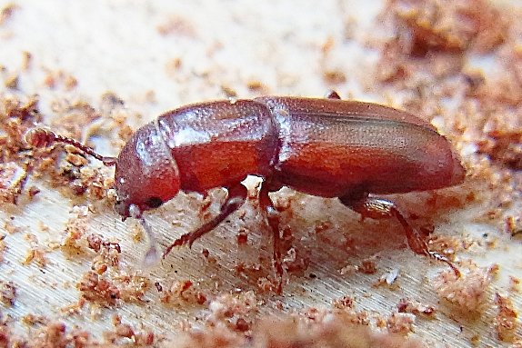 Pityophagus laevior aus Südwestfrankreich, bei 32150 Barbotan les Thermes Cazaubon unter Rinde toter Kiefer am 12. Mai 2013